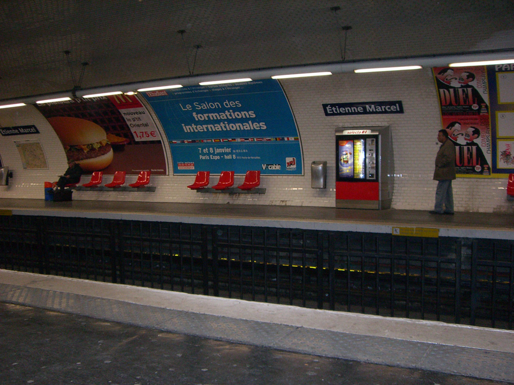 Station de métro Étienne Marcel